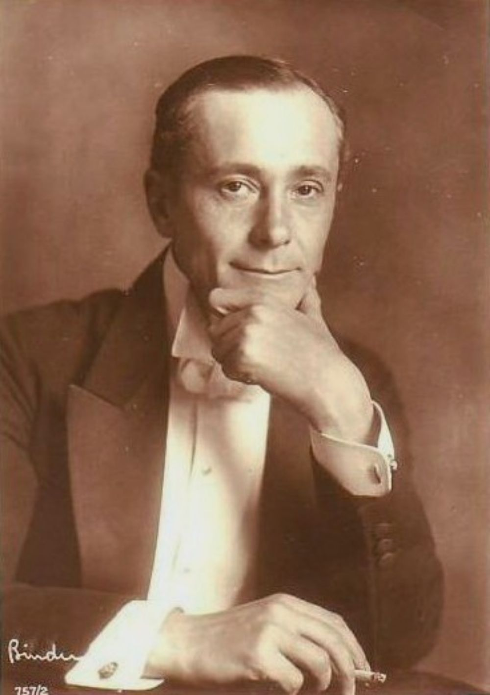 Alfred Abel, by Alexander Binder This image is a movie star postcard published by Ross Verlag in Berlin. This is image nr. 757/2 from their series. It was published ca. 1925–1926. This tag does not indicate the copyright status of the attached work. A normal copyright tag is still required. See Commons:Licensing for more information. In particular, Ross images are in the public domain in Germany only if it can be shown that the photographer (usually mentioned on the image itself) has died more than 70 years ago. Ross images that are in the public domain in Germany may still be copyrighted in the United States if they were first published later than 1922 and were still copyrighted in Germany on January 1, 1996 (i.e. if the photographer died in 1926 or later).